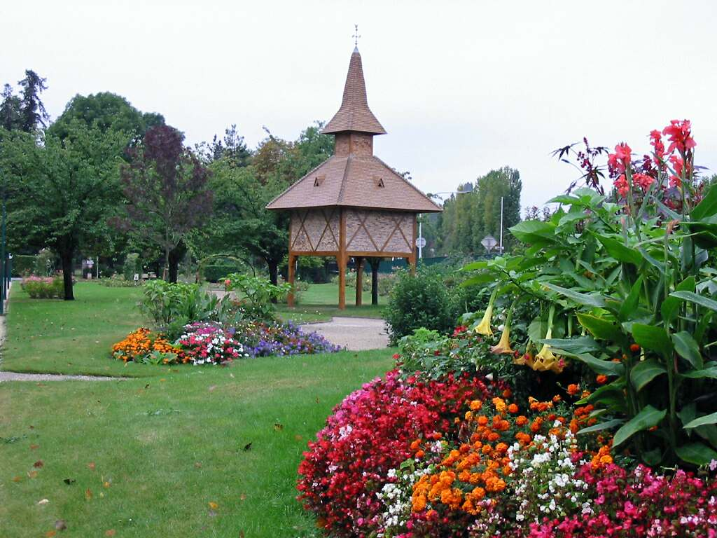 Pigeonnier à l'entrée du parc Meissonier à Poissy (Yvelines) Photo JH Mora, septembre 2005.